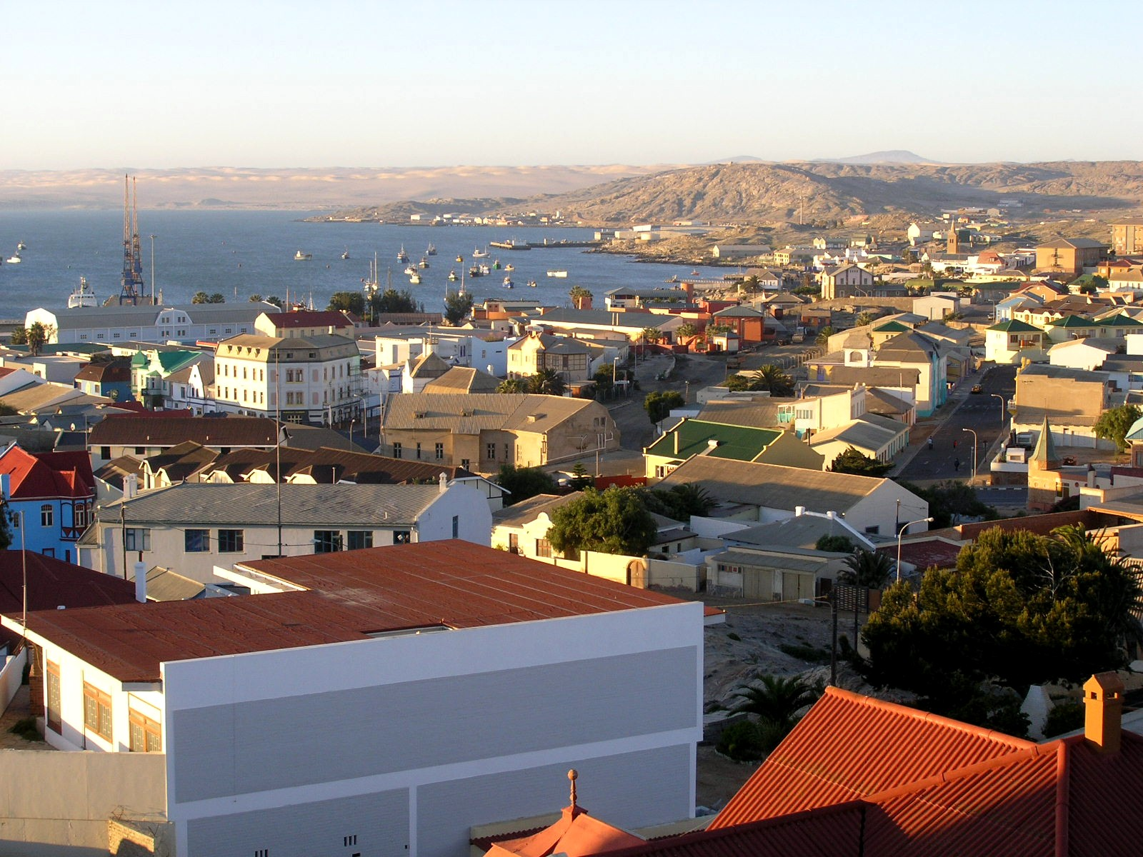 Luderitz, Blick von der Felsenkirche ueber die Stadt 2